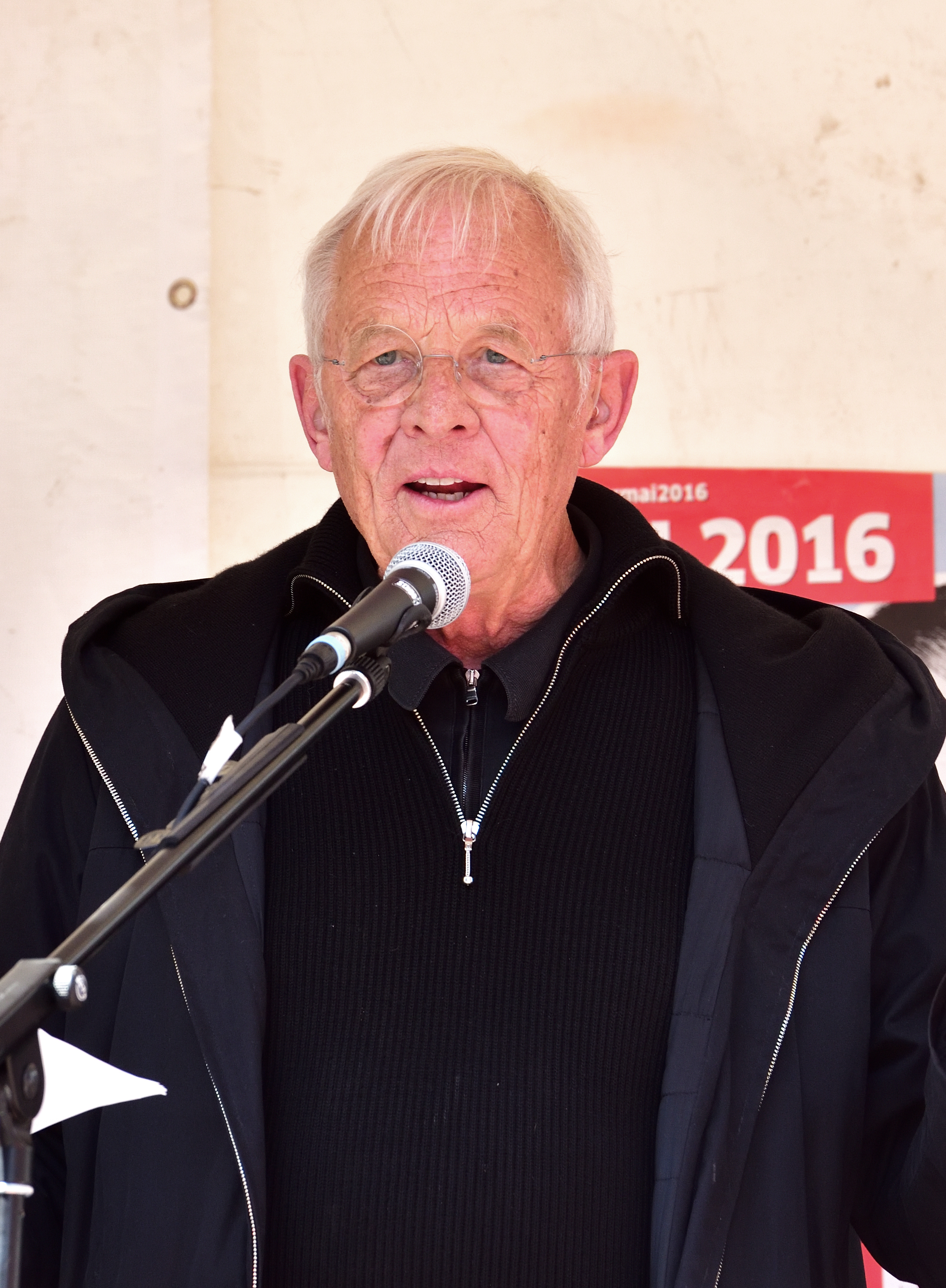 Rolf Becker bei einer Veranstaltung in Elmshorn